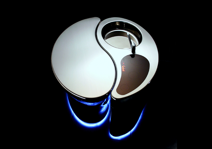 オールステンレス製のキッチンシステム